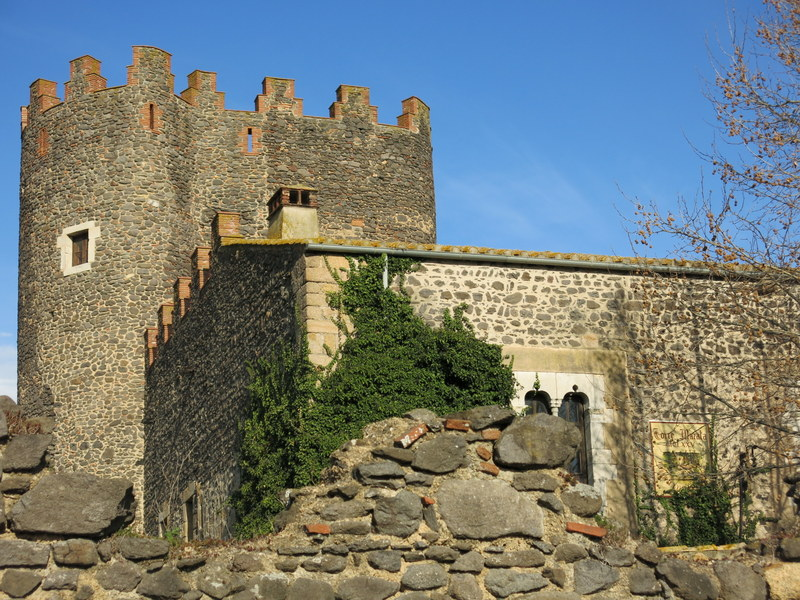 Torre Marata a Maçanet de la Selva - Catalunya